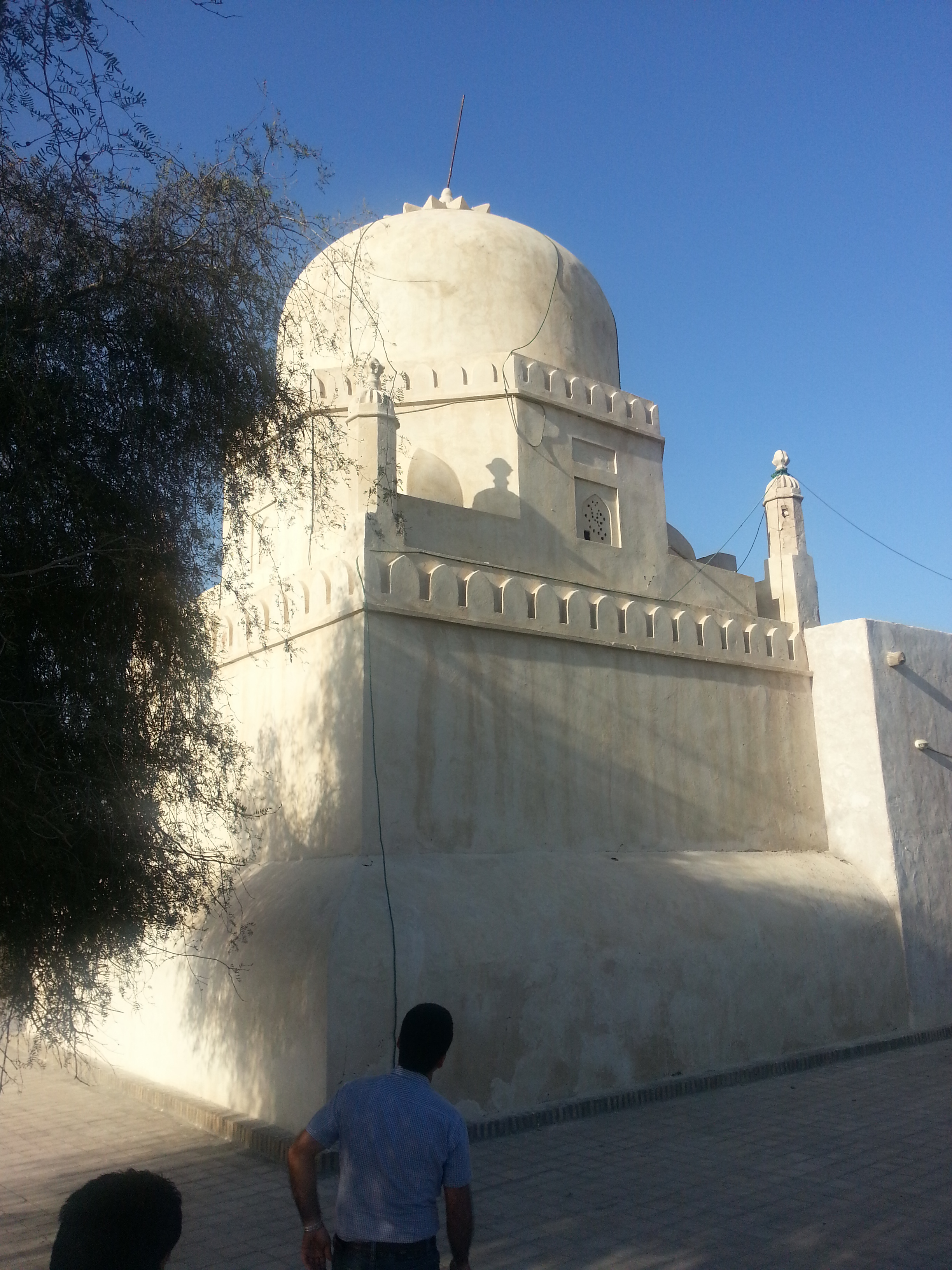 Seyyed Gholam Rasool Mausoleum, Chabahar (بقعه سید غلام رسول، چابهار)